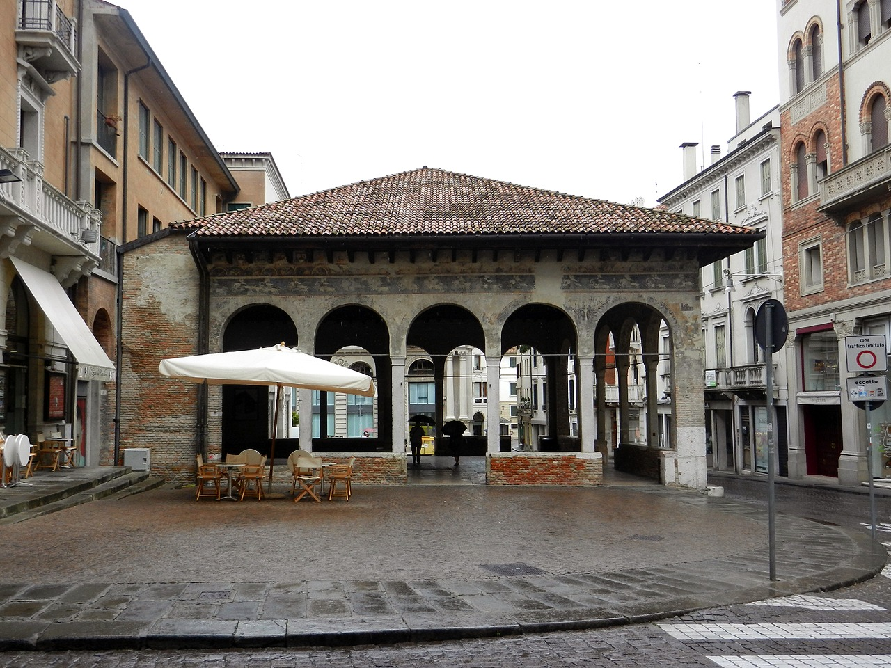 Treviso - Loggia dei Cavalieri